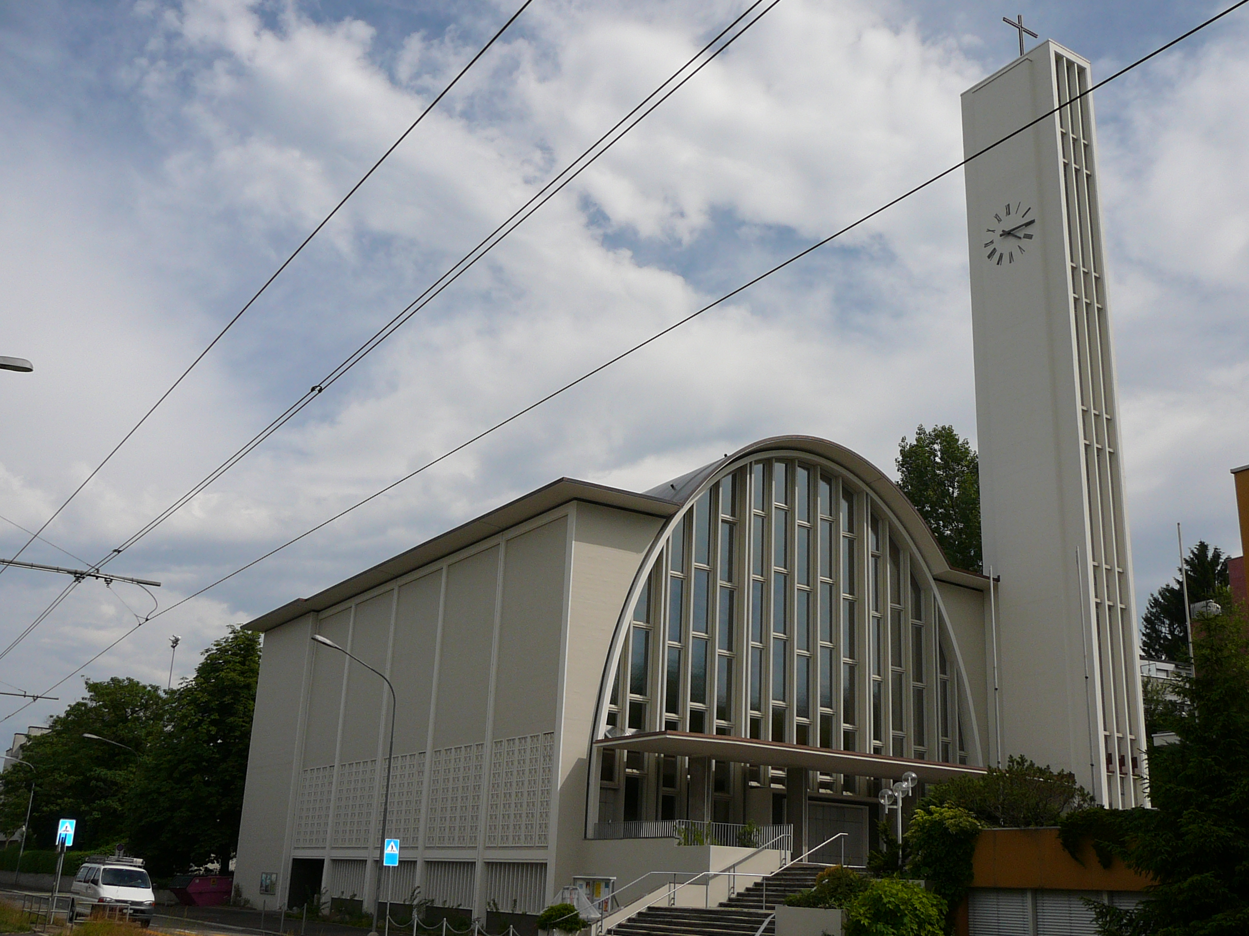 Römisch-katholische Kirche St. Gallus, Blick von der Dübendorfstrasse